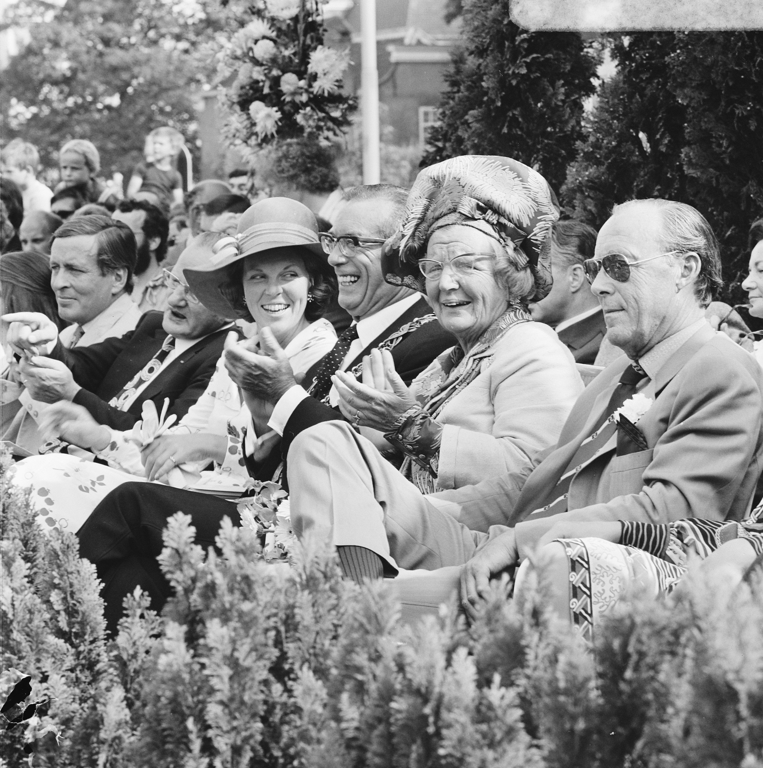 Koninklijke familie viert Zilveren Regeringsjubileum in Tilburg, v.l.n.r. prins Claus, prinses Beatrix, Burgemeester Cees Becht van Tilburg, koningin Juliana en prins Bernhard. (Tilburg, 5 september 1973)